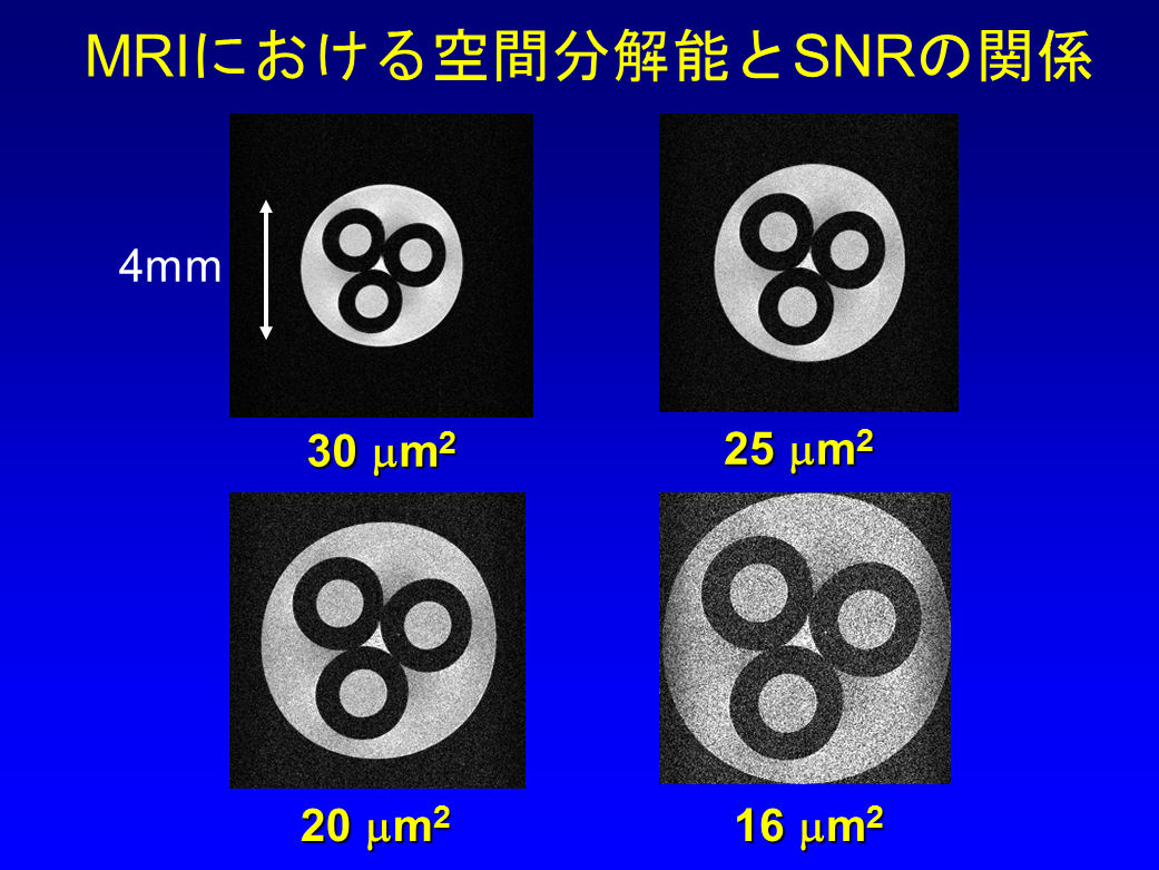 MRIにおける画素サイズとSNRを示す図です．